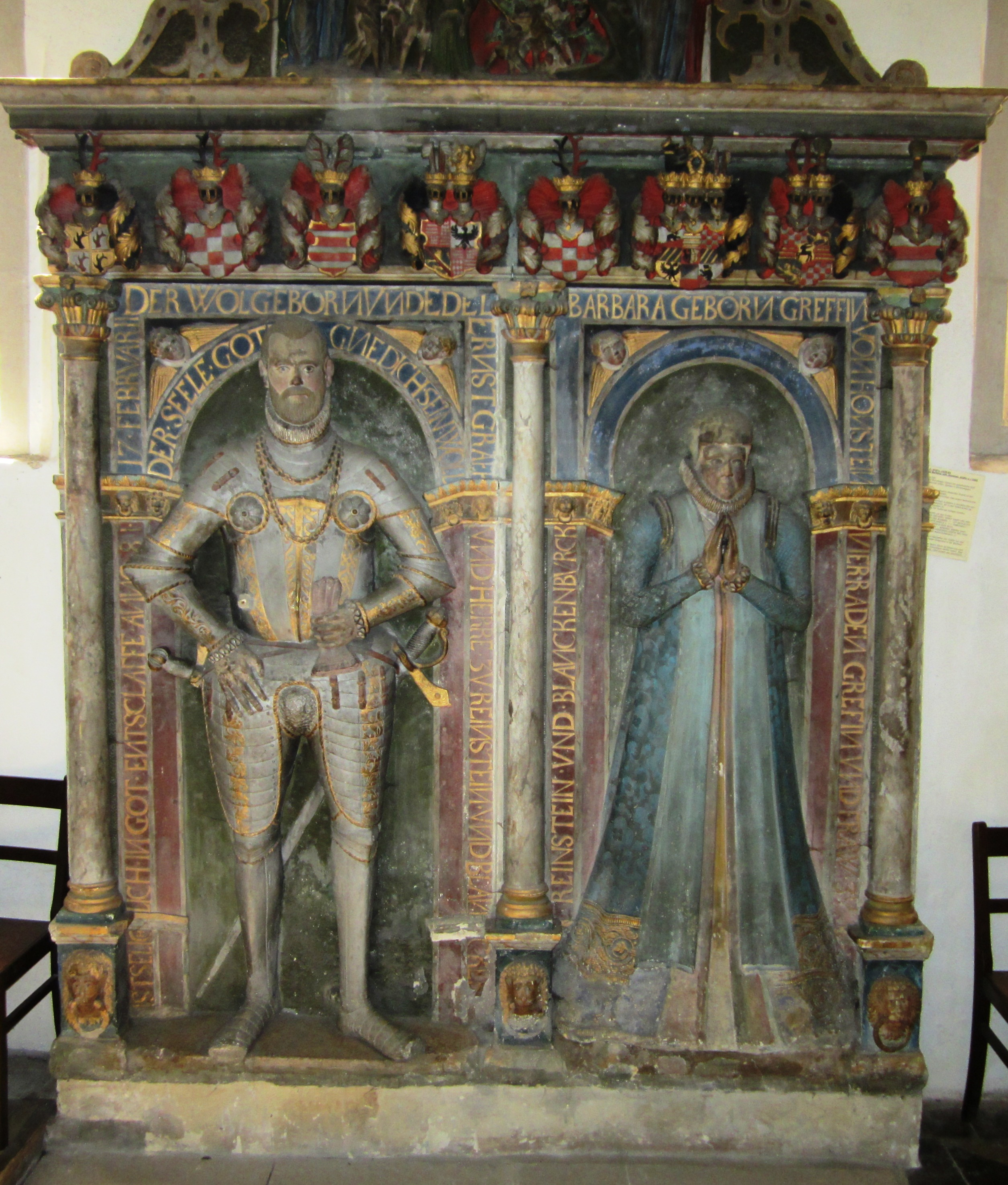 Grabmal des Grafen Ernst I. von Regenstein († 1581) und seiner Frau Barbara in der Bartholomäuskirche in Blankenburg (Harz)